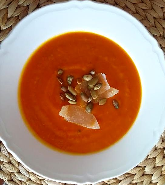 Zupa z dyni